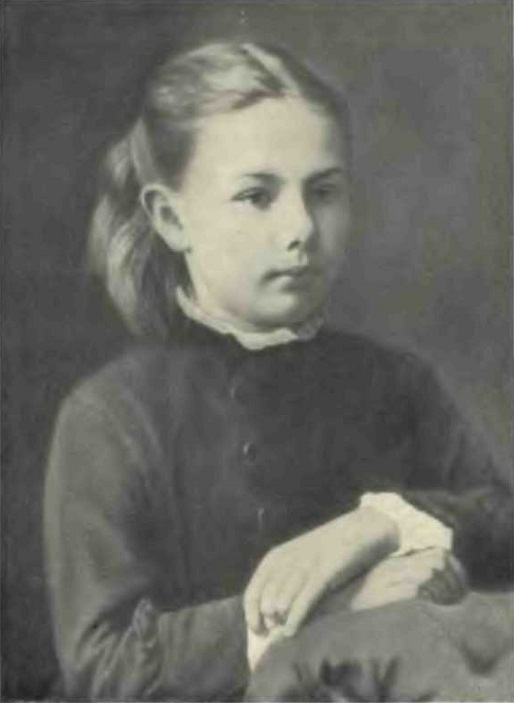 Nadezda Krupskaja (1869-1939) a 10 anni